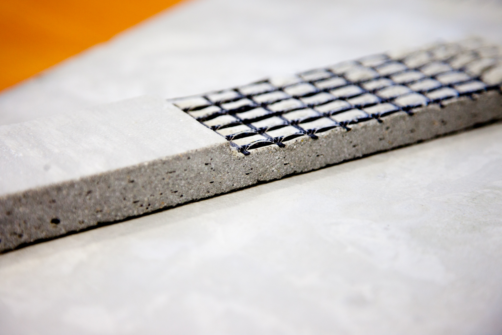 Beton mit einer Lage Carbon